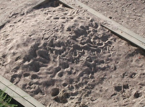 Sanden behöver bytas ut oftare.